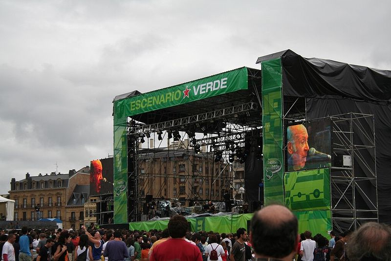 Mikel Laboa en concierto, Donostia julio 2006